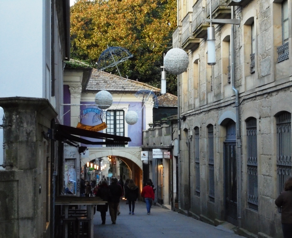 Calle Don Gonzalo Pontevedra capital